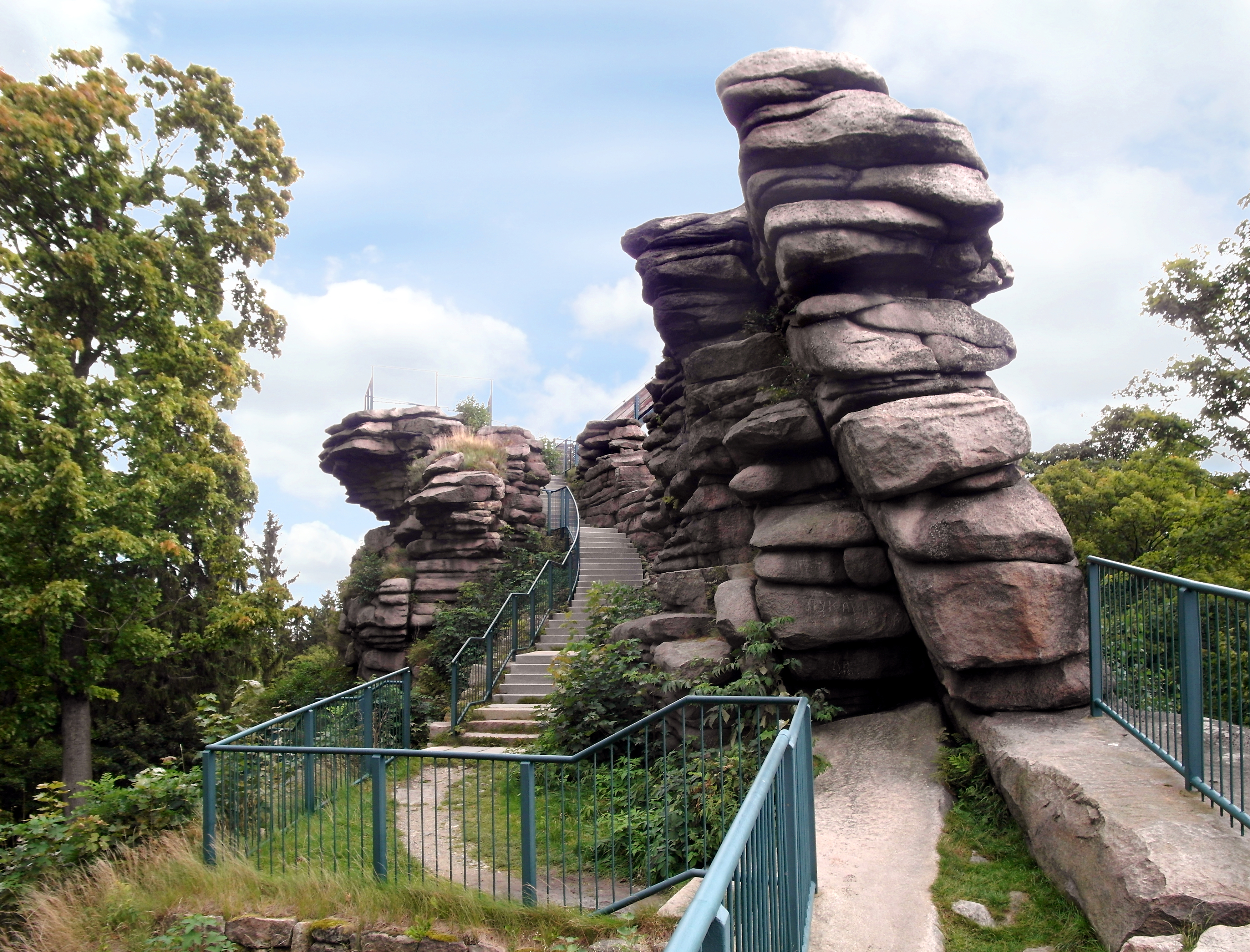 11.09.2017 09427 Ehrenfriedersdorf, Greifensteinstraße: Burgruine Greifenstein (GMP: 50.649317,12.930100). Erster Nachweis um 1530, später verschollen, Wiederentdeckung 1969. [SAM2001.JPG]20170911510DR.JPG(c)Blobelt